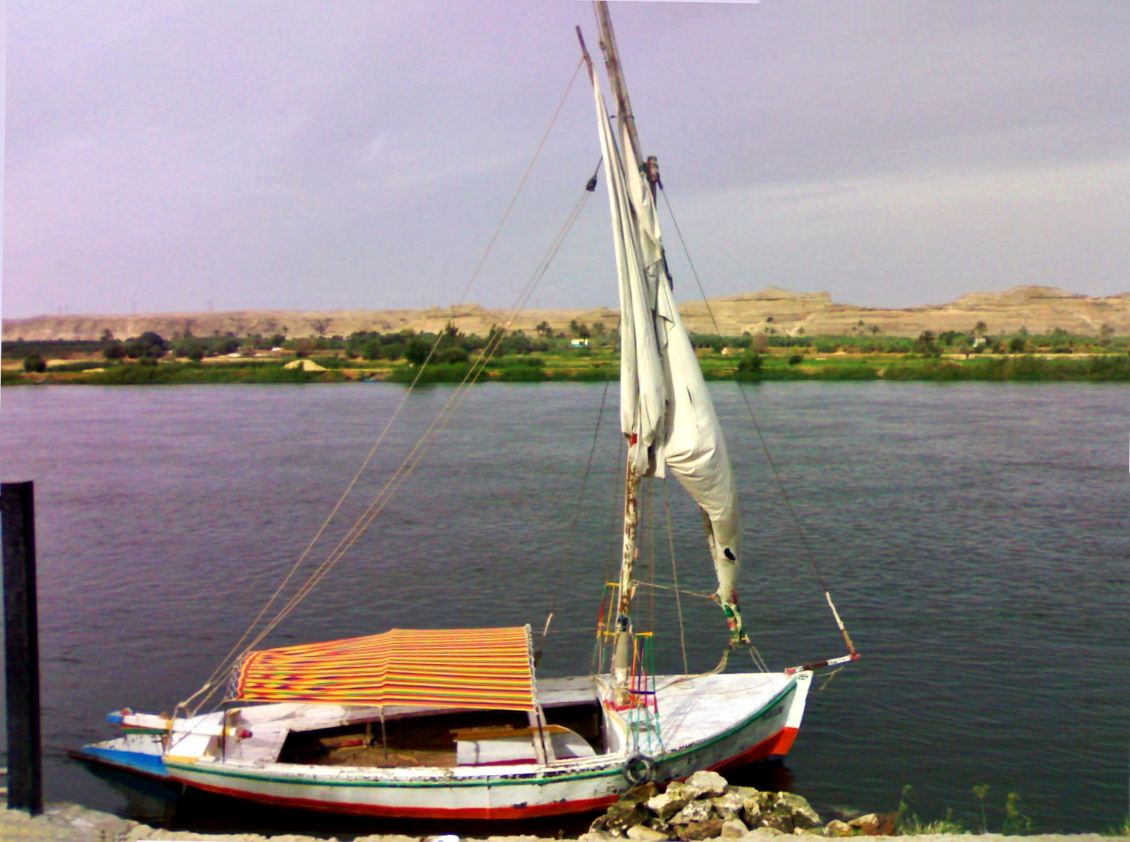 المنيا، مصر